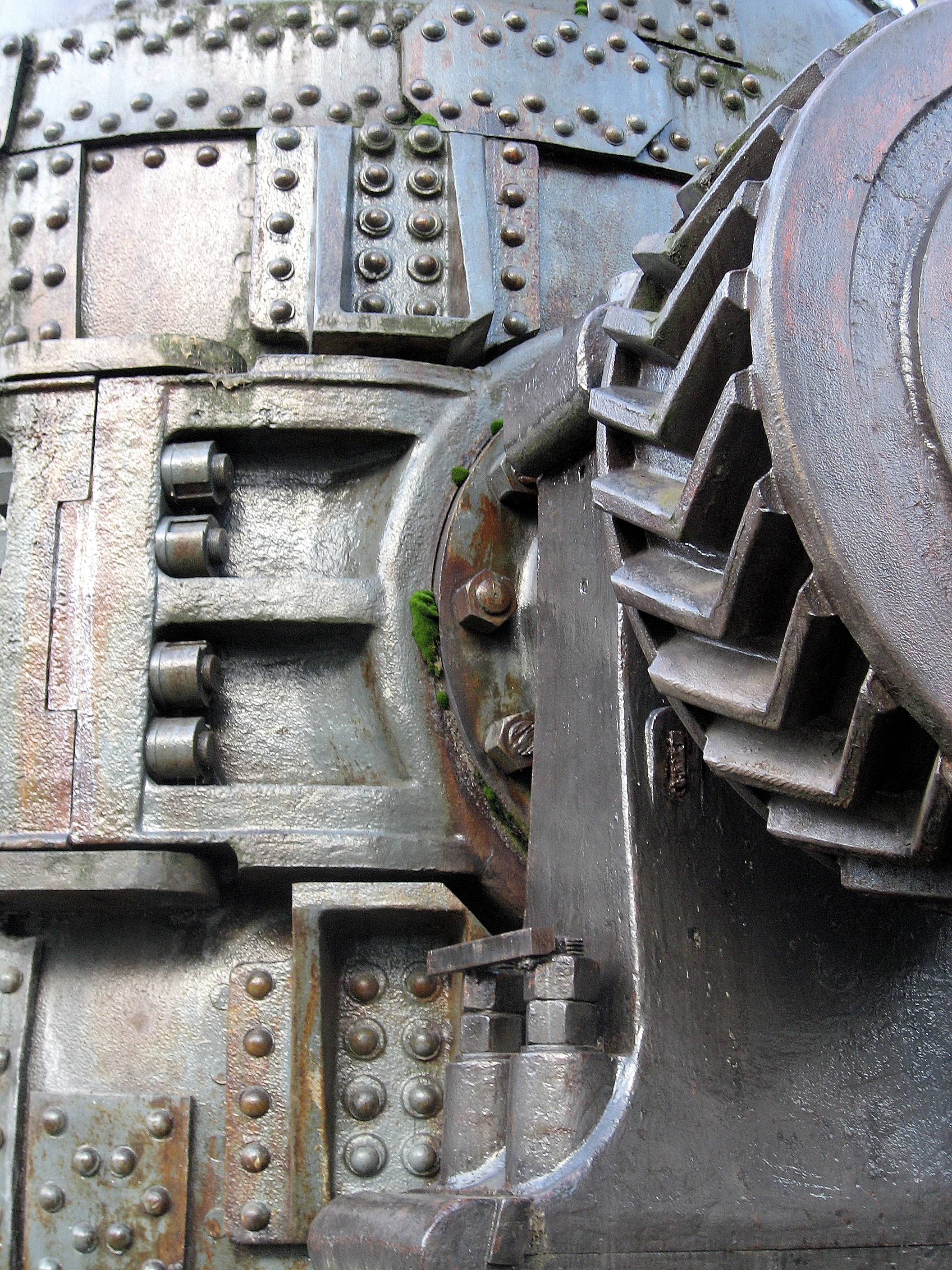 Dortmund-Hörde, Thomas-Konverter vor der Hörder Burg, Detail letzte Thomasbirne, die 1954 in der Hörder Kesselschmiede gebaut wurde, bis zur Schließung des Thomasstahlwerks 1964 im Einsatz; Gewicht: 68 Tonnen, Höhe ca. 7 Meter, seit 2002 Industriedenkmal